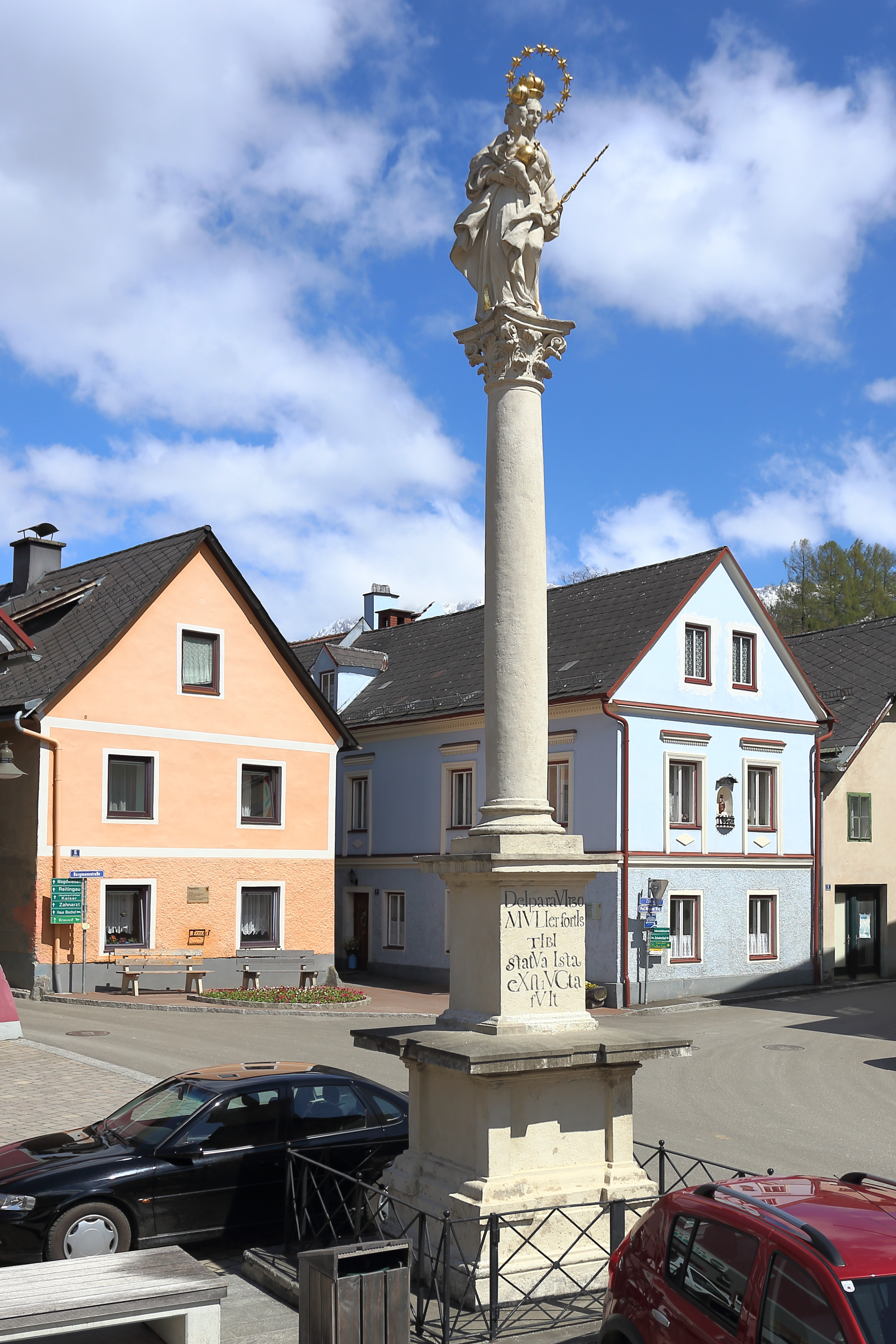 Denkmalgeschützte Mariensäule am Hauptplatz in der steiermärkischen Marktgemeinde Mautern.